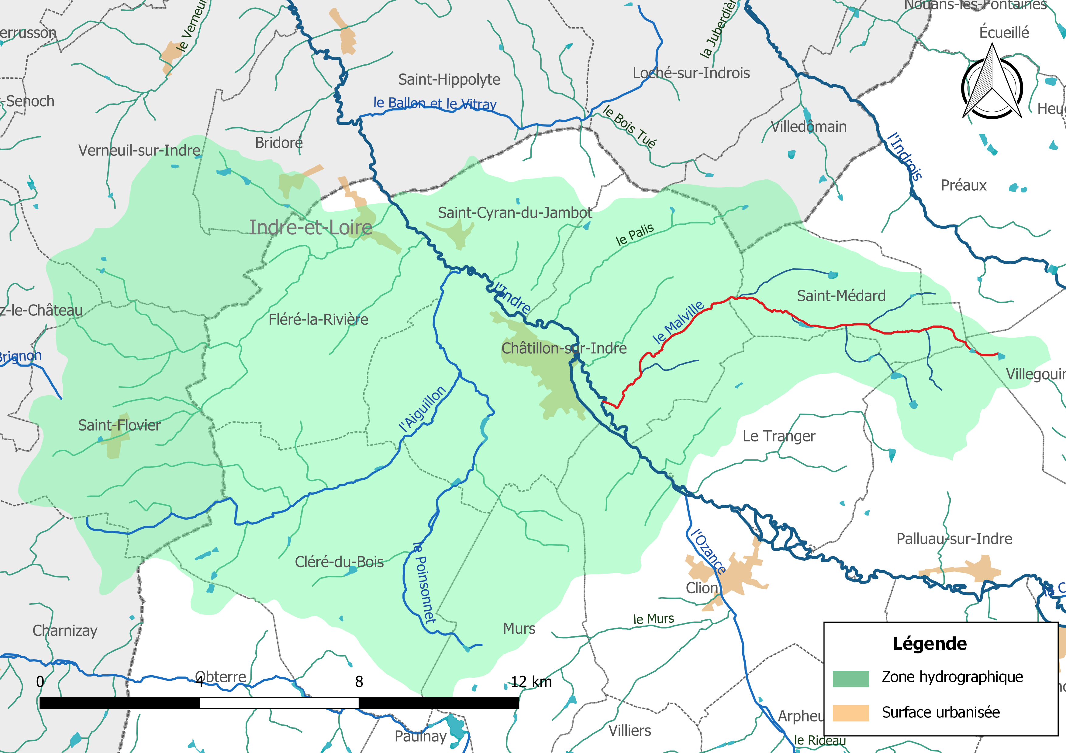 Carte du cours d'eau « le Malville » (France) et de la zone hydrographique dans laquelle il s'insère.